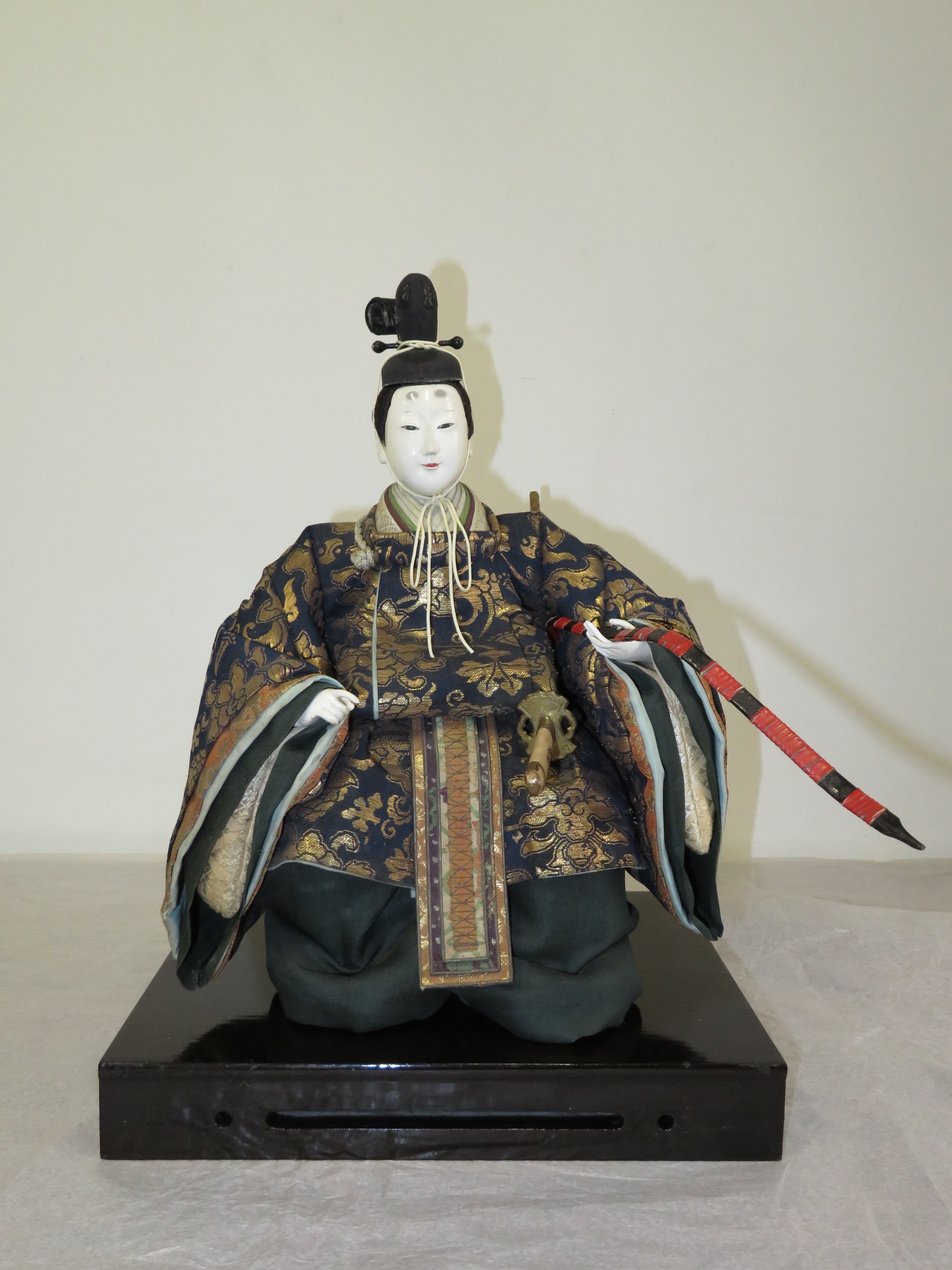 2018年2月27日-3月18日 東京国立博物館展示風景